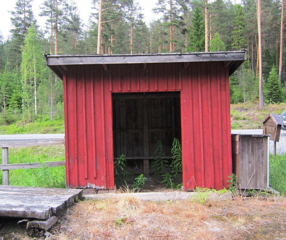 Fløtterud holdeplass på Numedalsbanen